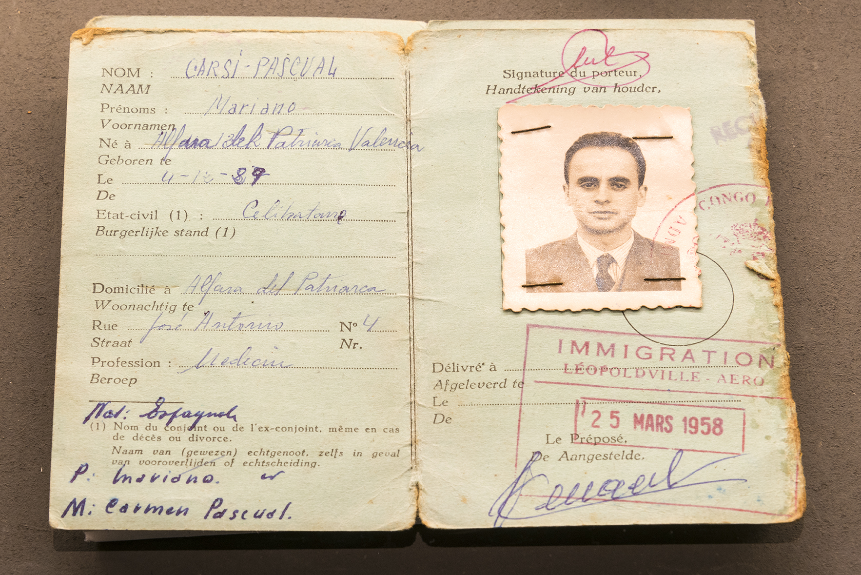 Exposició temporal "Doctor Carsí, supose?", dedicada a la col·lecció personal d'objectes de Mariano Carsí.